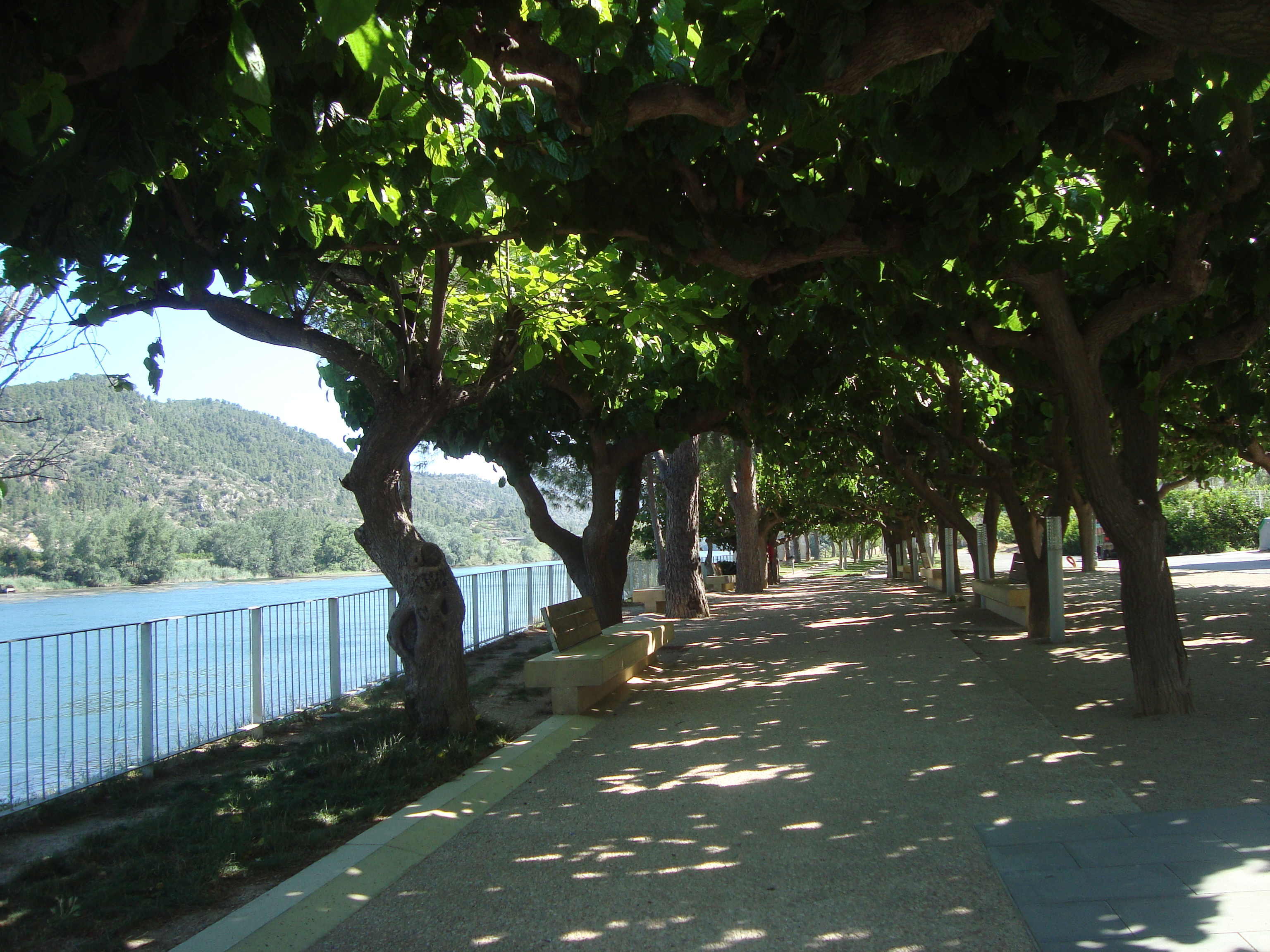 Benifallet, alameda a orillas del río Ebro.